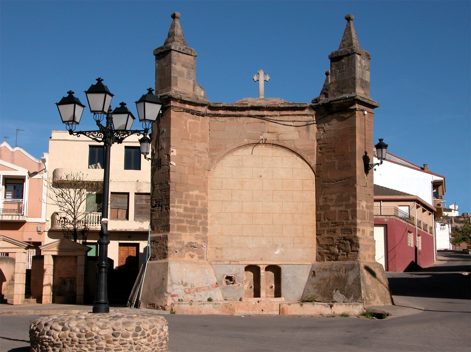 AUSEJO. Ermita del Crucifijo (sXVI).